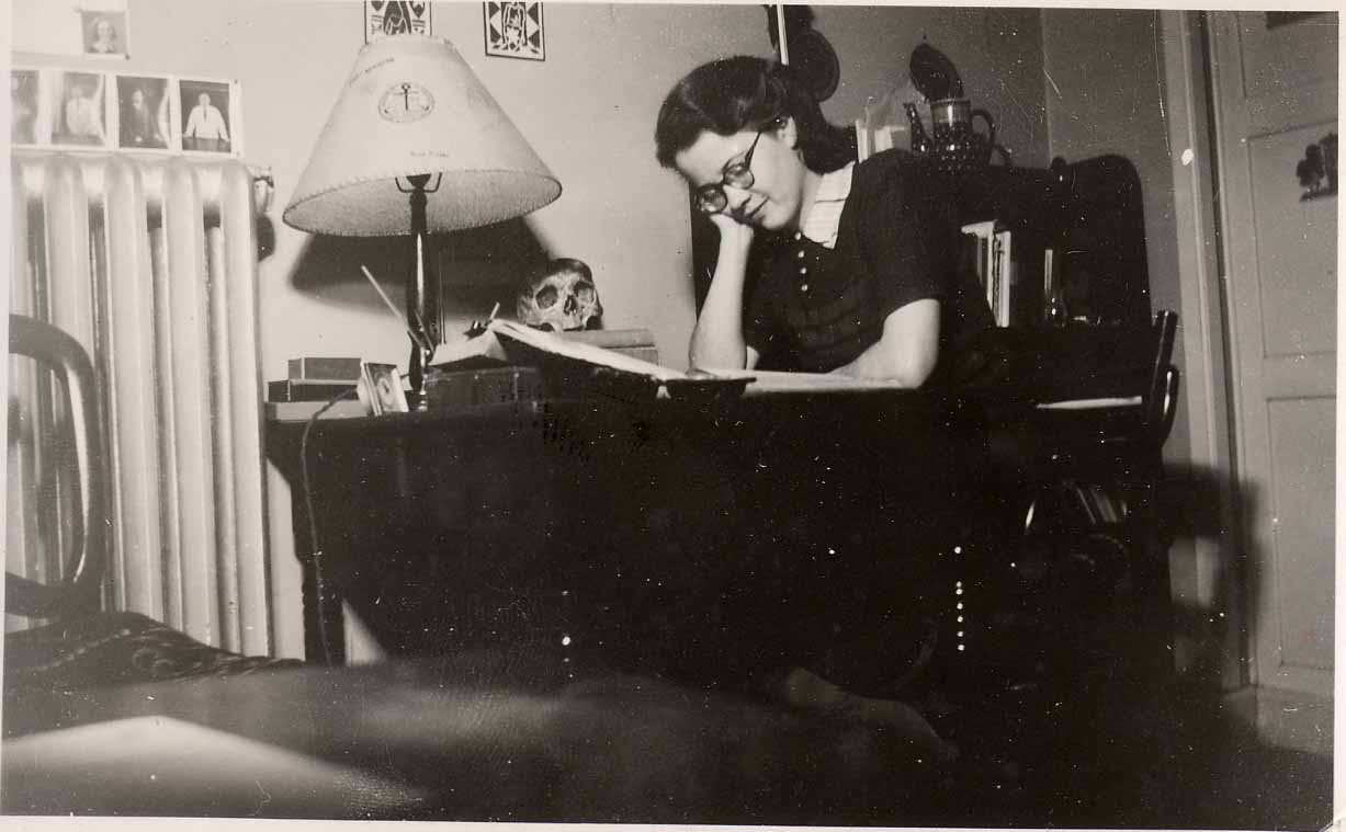 Ingrid von Staffeldt, née Vernegaard Jensen (1922-2013), Danish physician. In her room at Marselisborg Studentergaard, Aarhus.